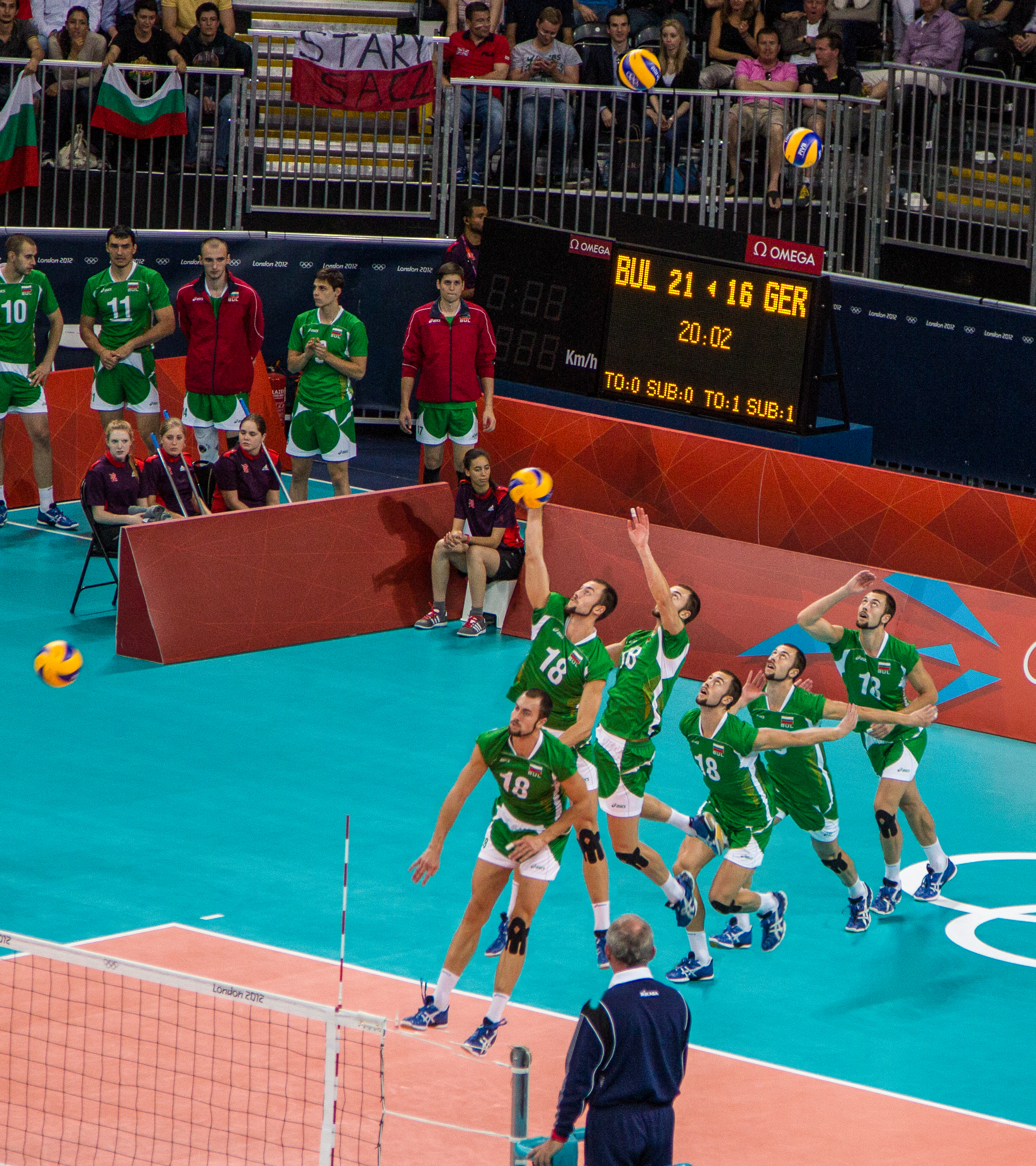 Nikolay Nikolov (volleyball)